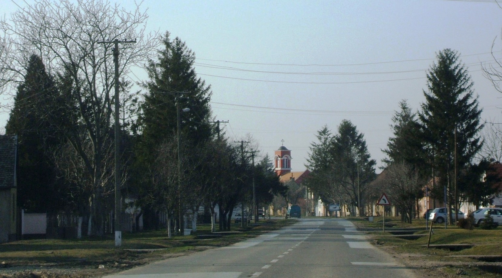 Гибарац (главна улица)